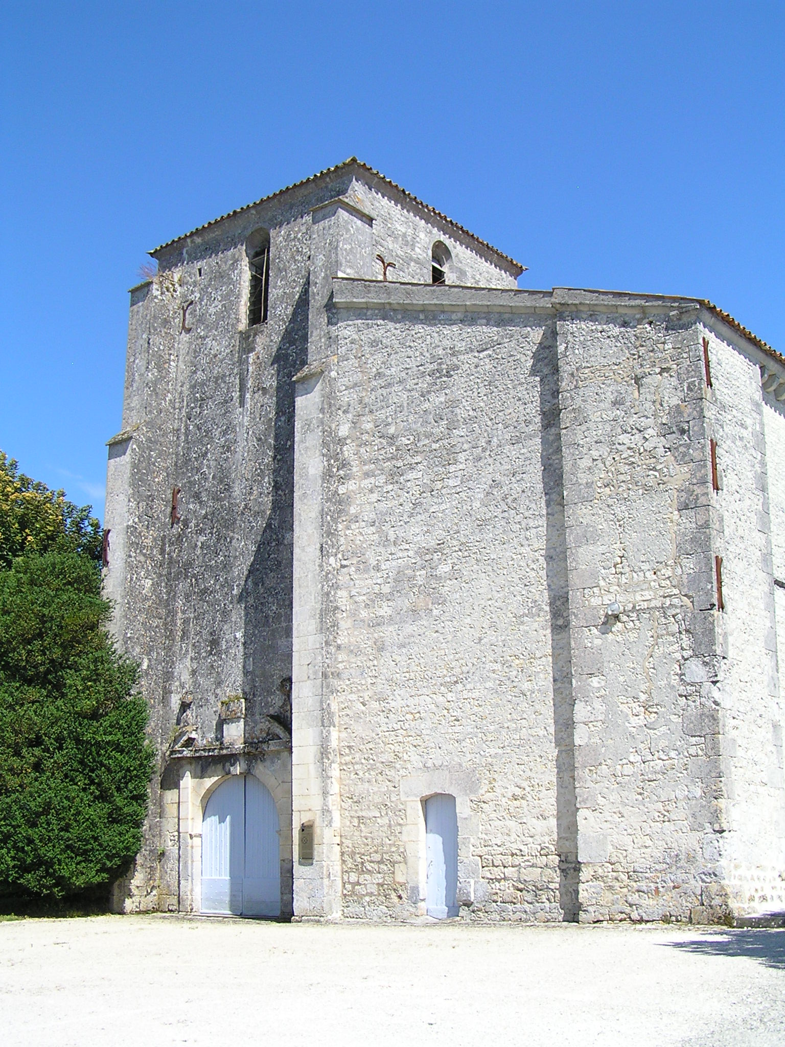 église de Verrières, Charente, France